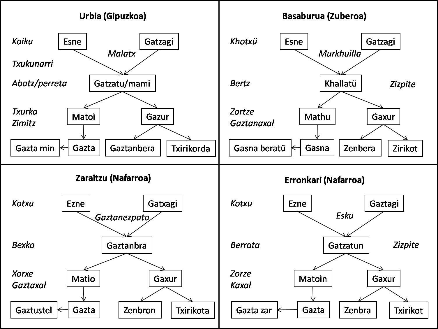 Gazta egiteko prozesua lau leku desberdinetan, bere izenekin.